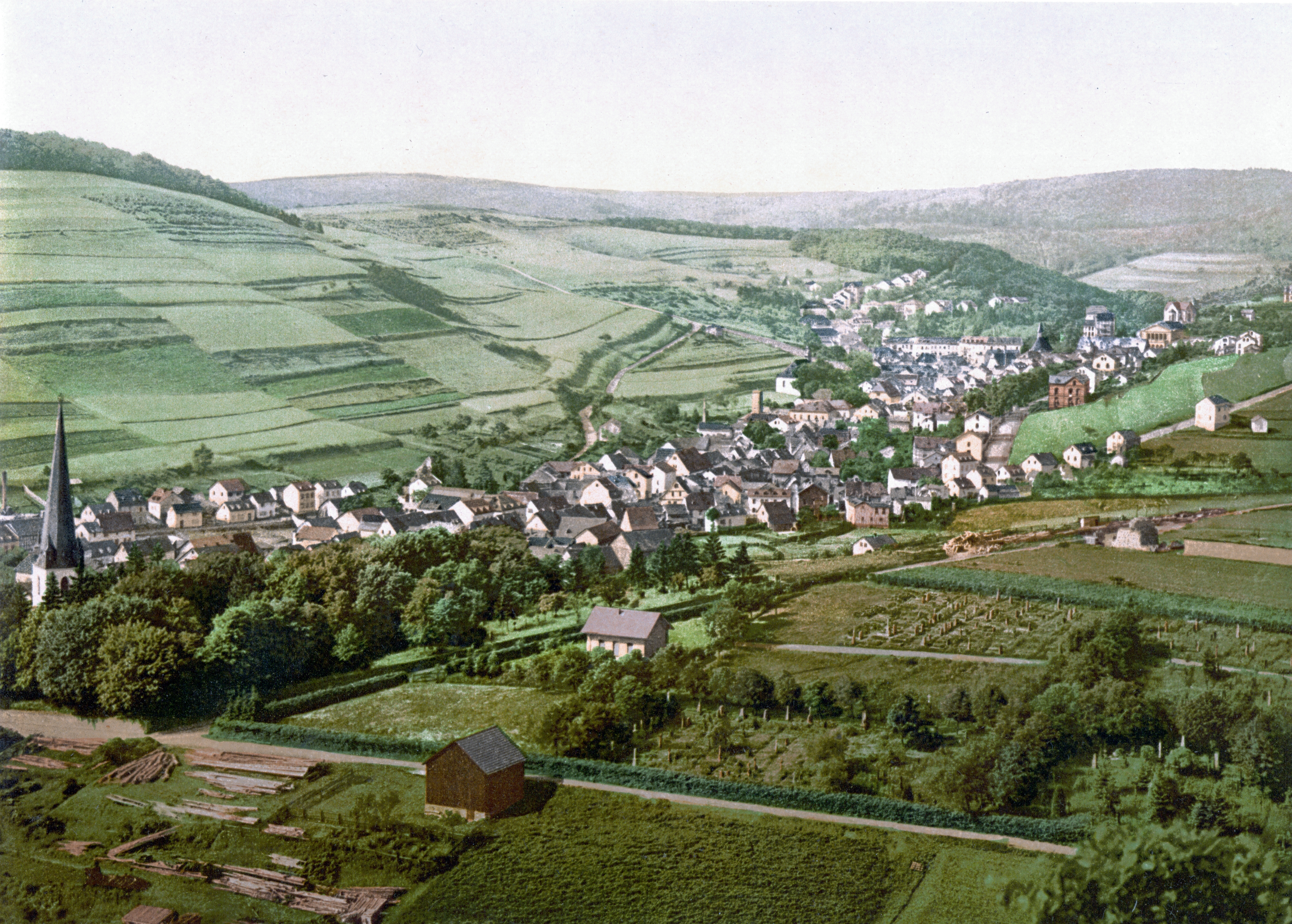 Bad Langenschwalbach